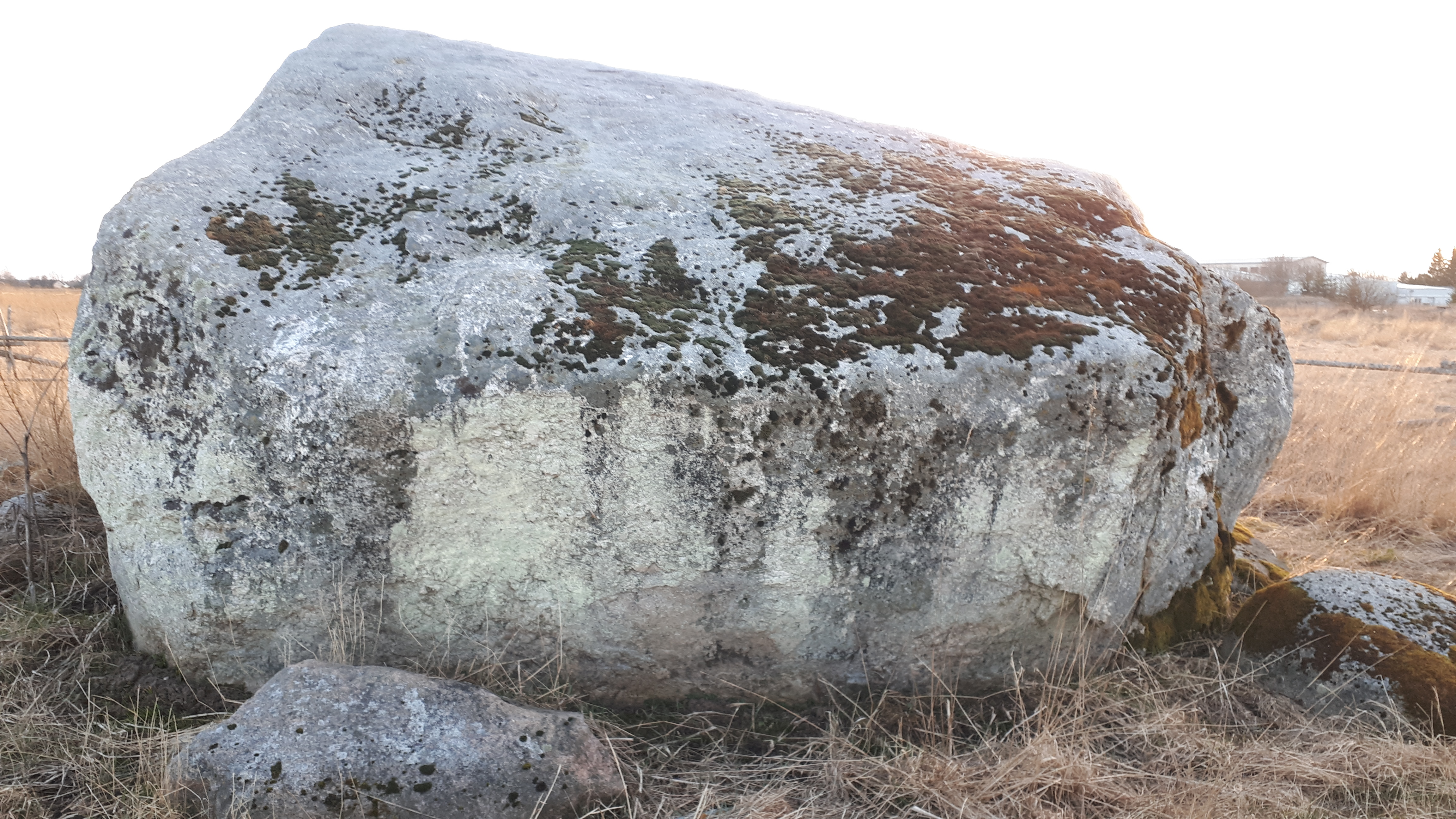 Kostivere liukivi